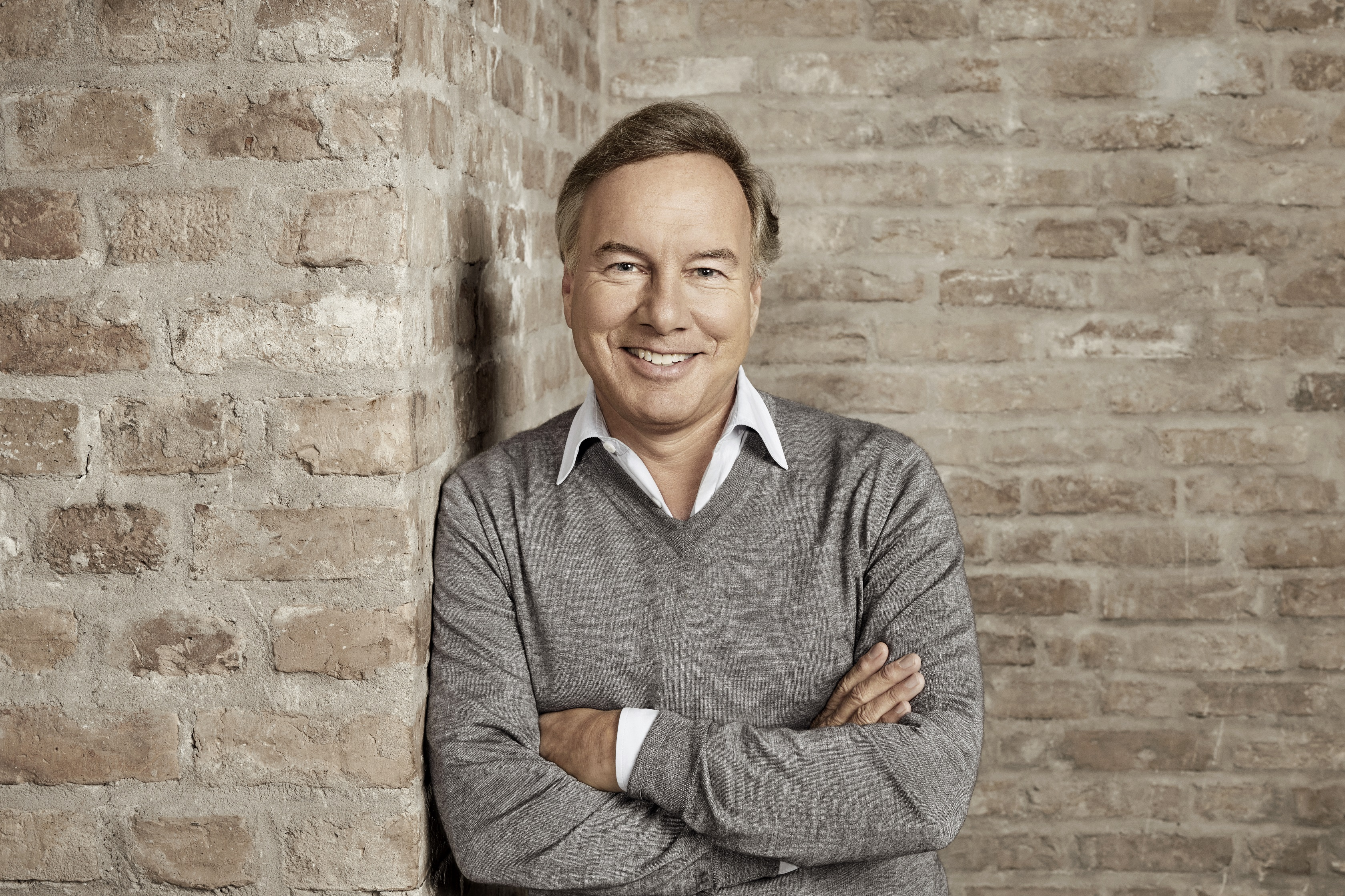 Nico Hofmann, CEO UFA GmbH